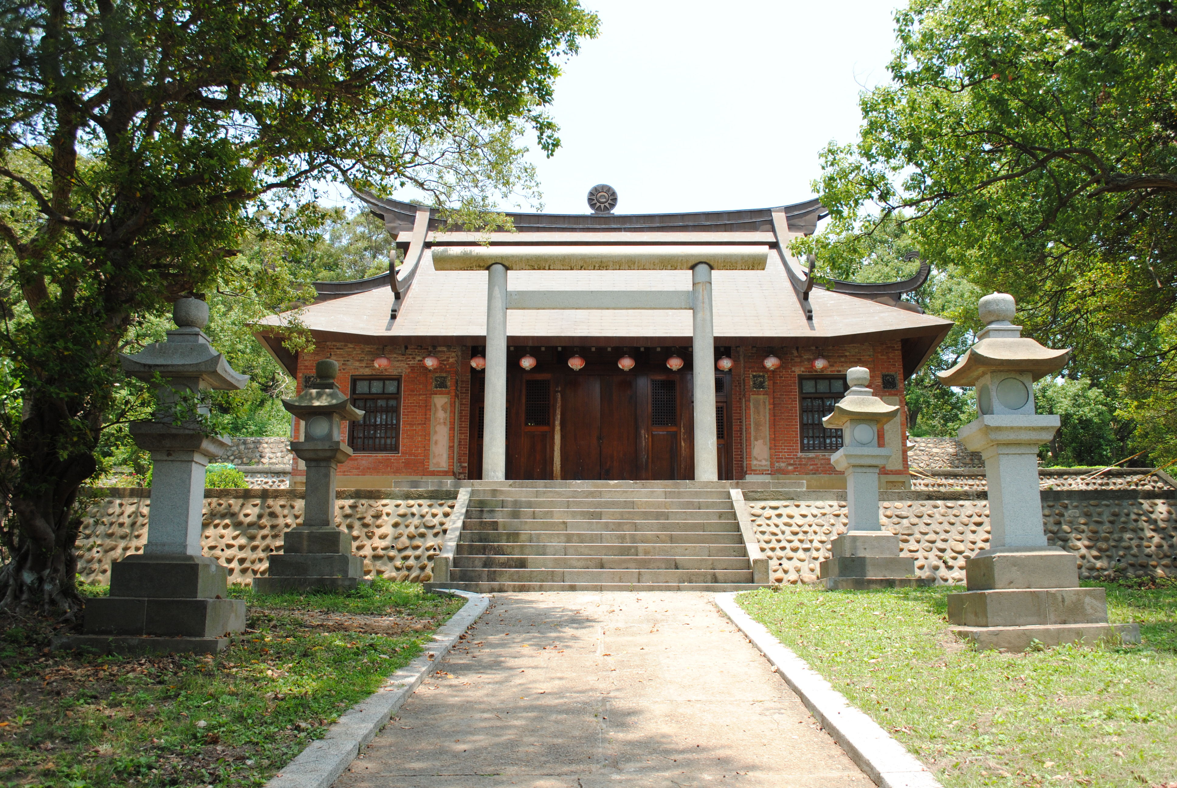 拜殿曾改裝為忠烈祠